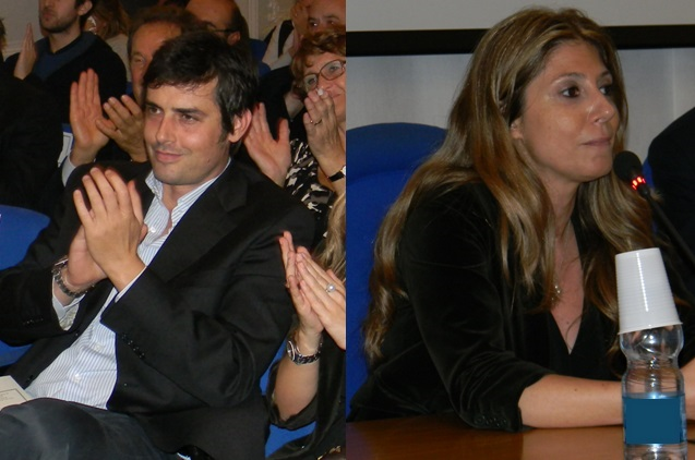 i produttori cinematografici Valentina di Giuseppe e Massimiliano Leone in una conferenza stampa di presentazione del film Il pretore.